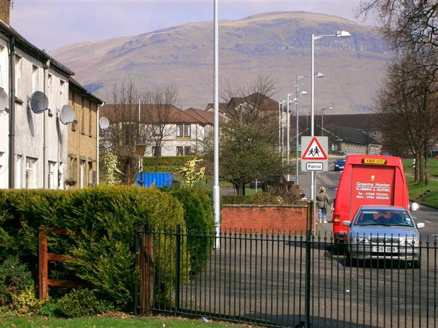 Tullibody, Clackmannan